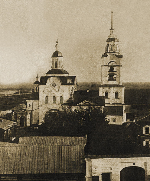 Туринский Свято-Николаевский монастырь (разрушен в 1920-е годы